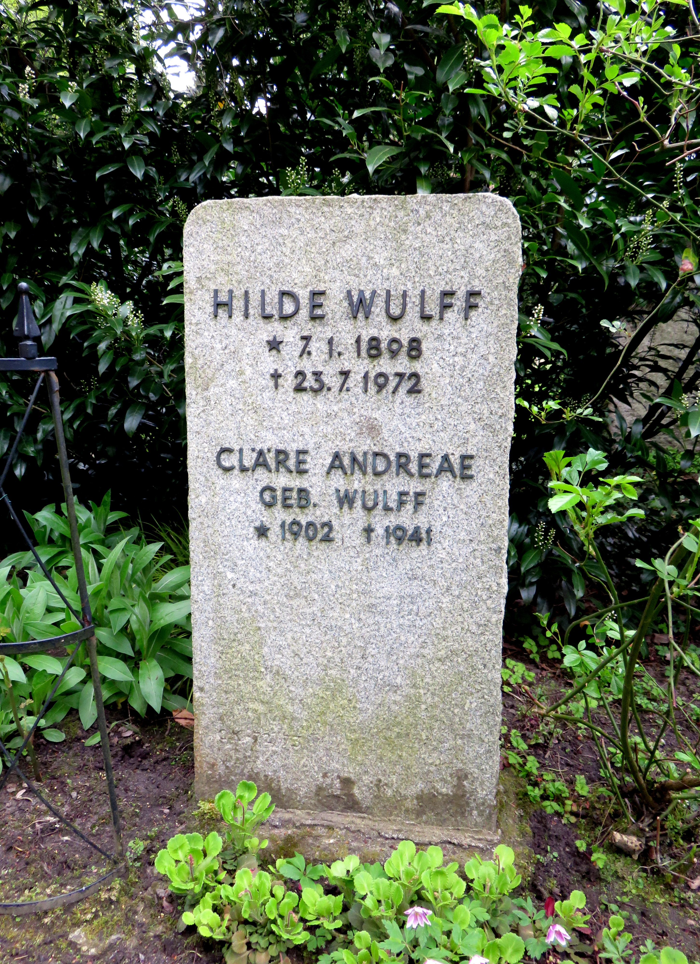 Historischer Grabstein der deutschen Sozialpädagogin Hilde Wulff im Bereich des Gartens der Frauen auf dem Ohlsdorfer Friedhof in Hamburg-Ohlsdorf.